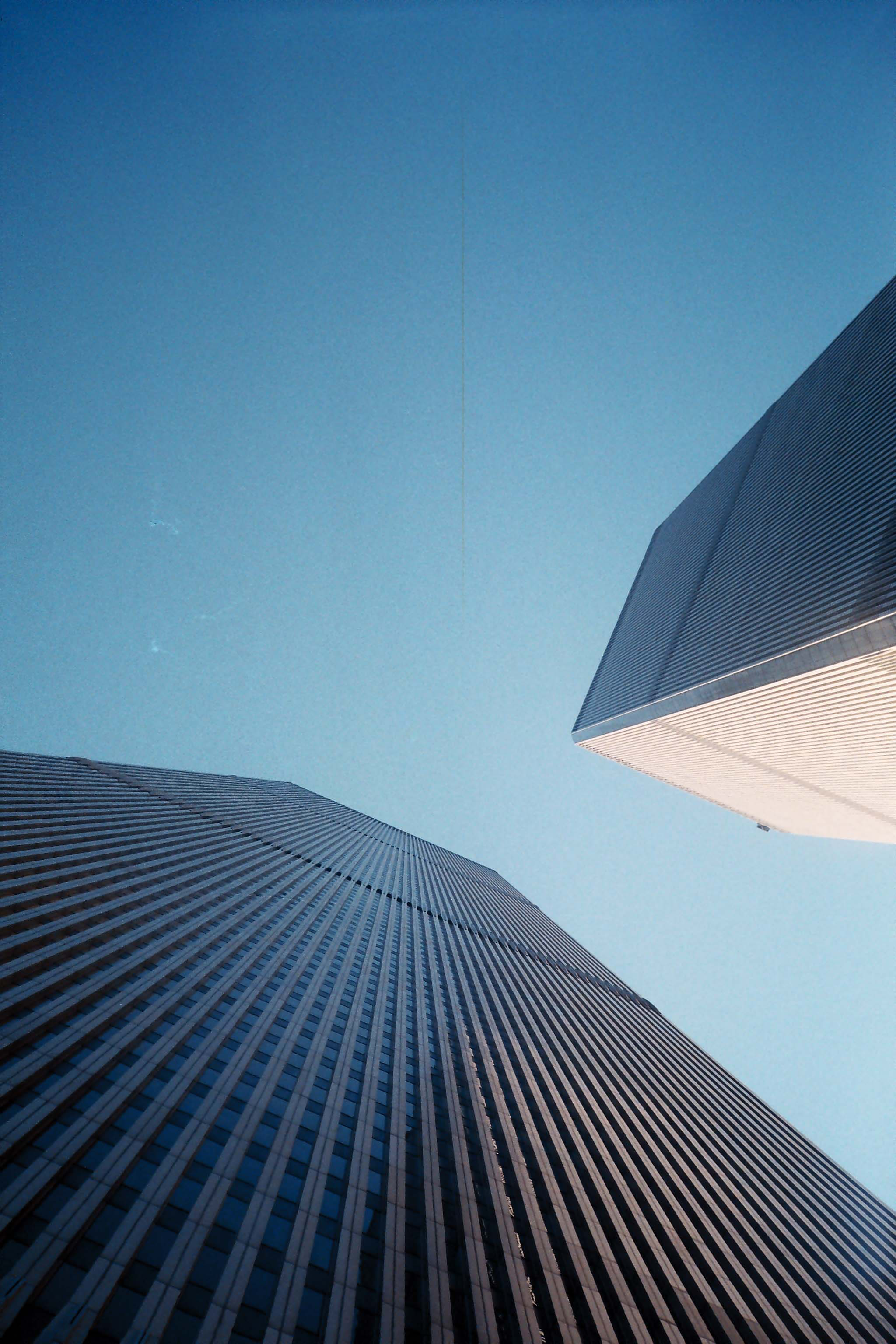 Les deux tours de l'ancien World Trade Center à New-York en 1997